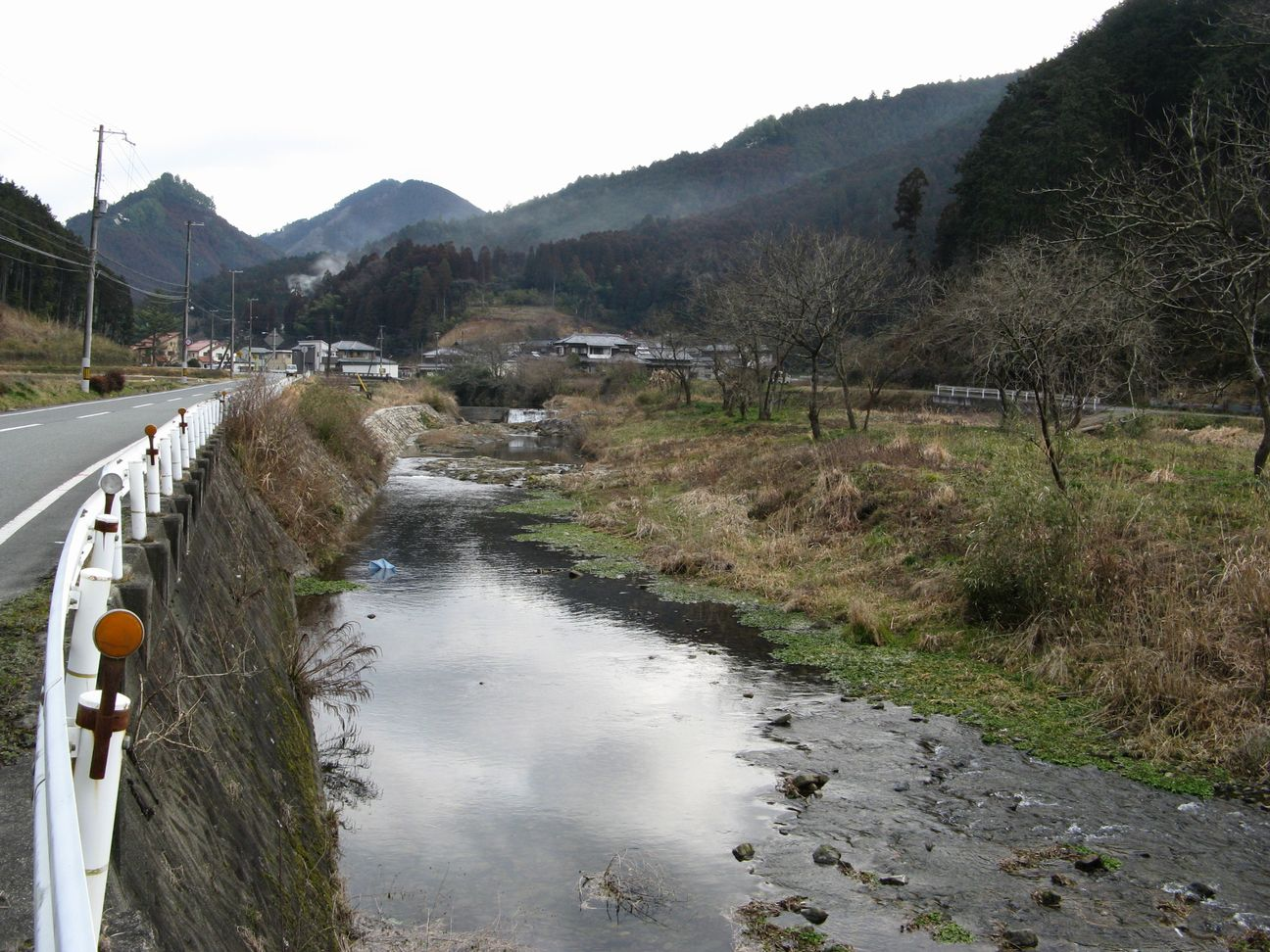 林田川 安富町末広から北望